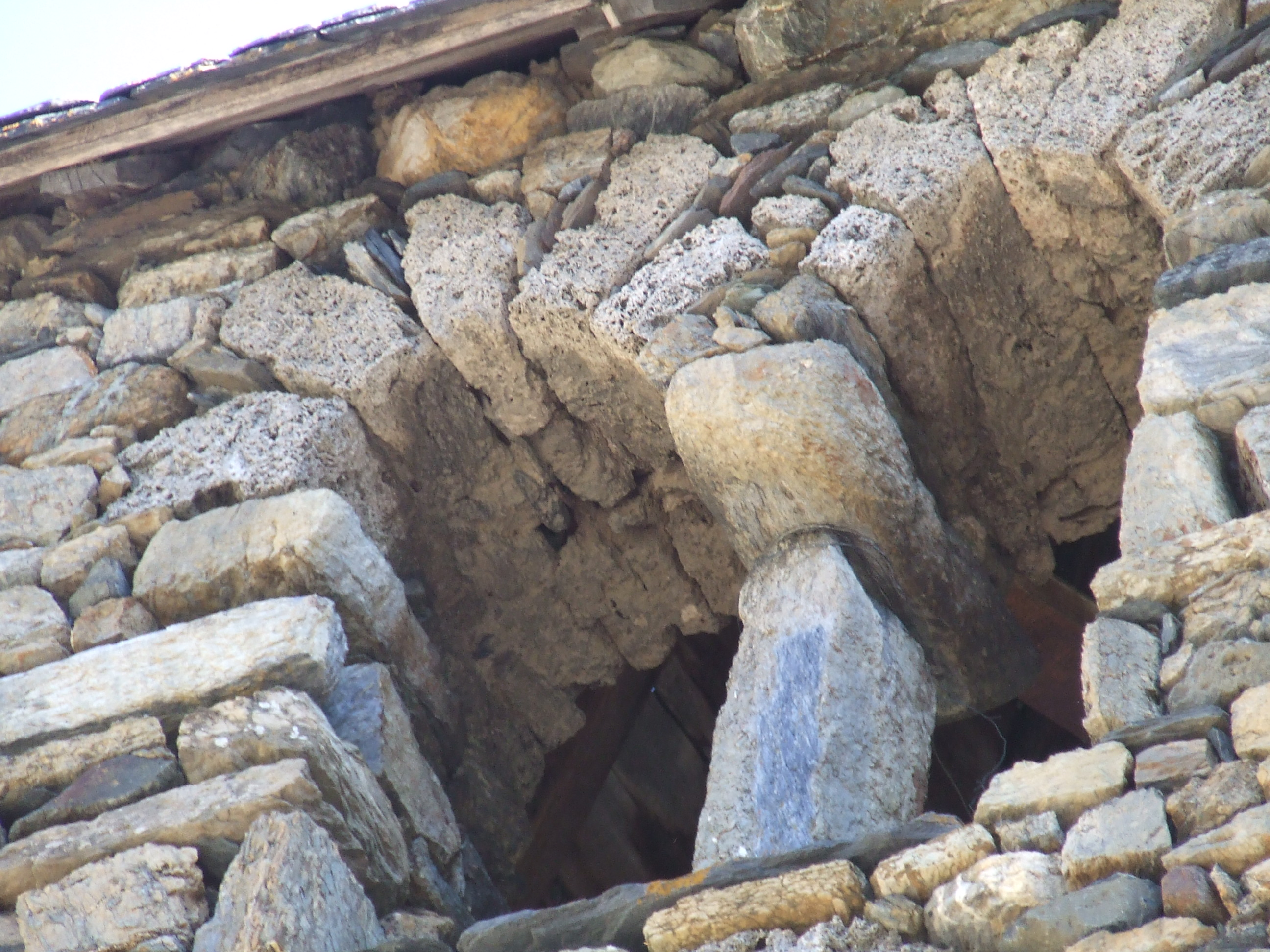 Detall de les finestres del campanar (Espui, la Torre de Cabdella, Pallars Jussà)